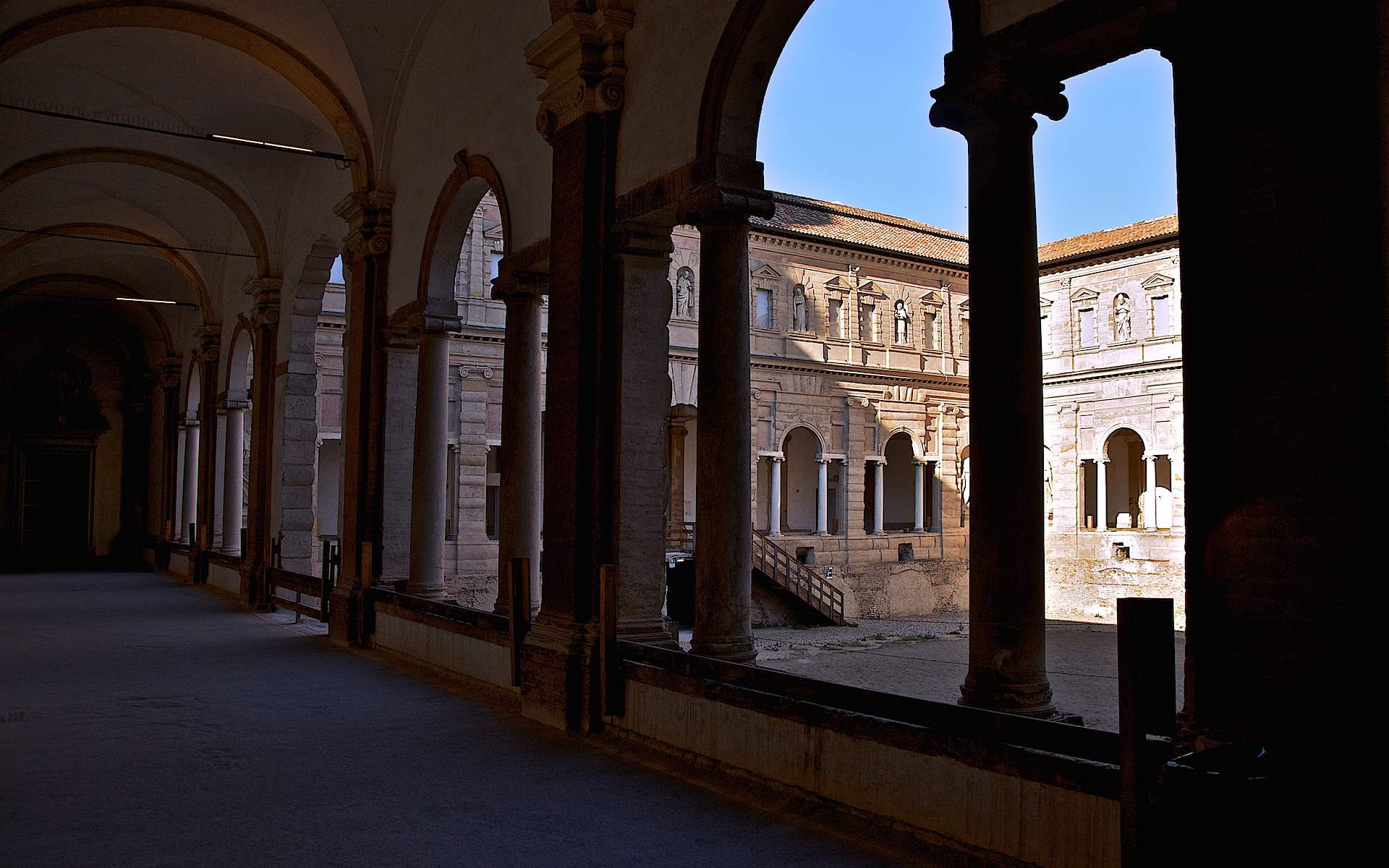 Chiostri di San Pietro This is a photo of a monument which is part of cultural heritage of Italy.